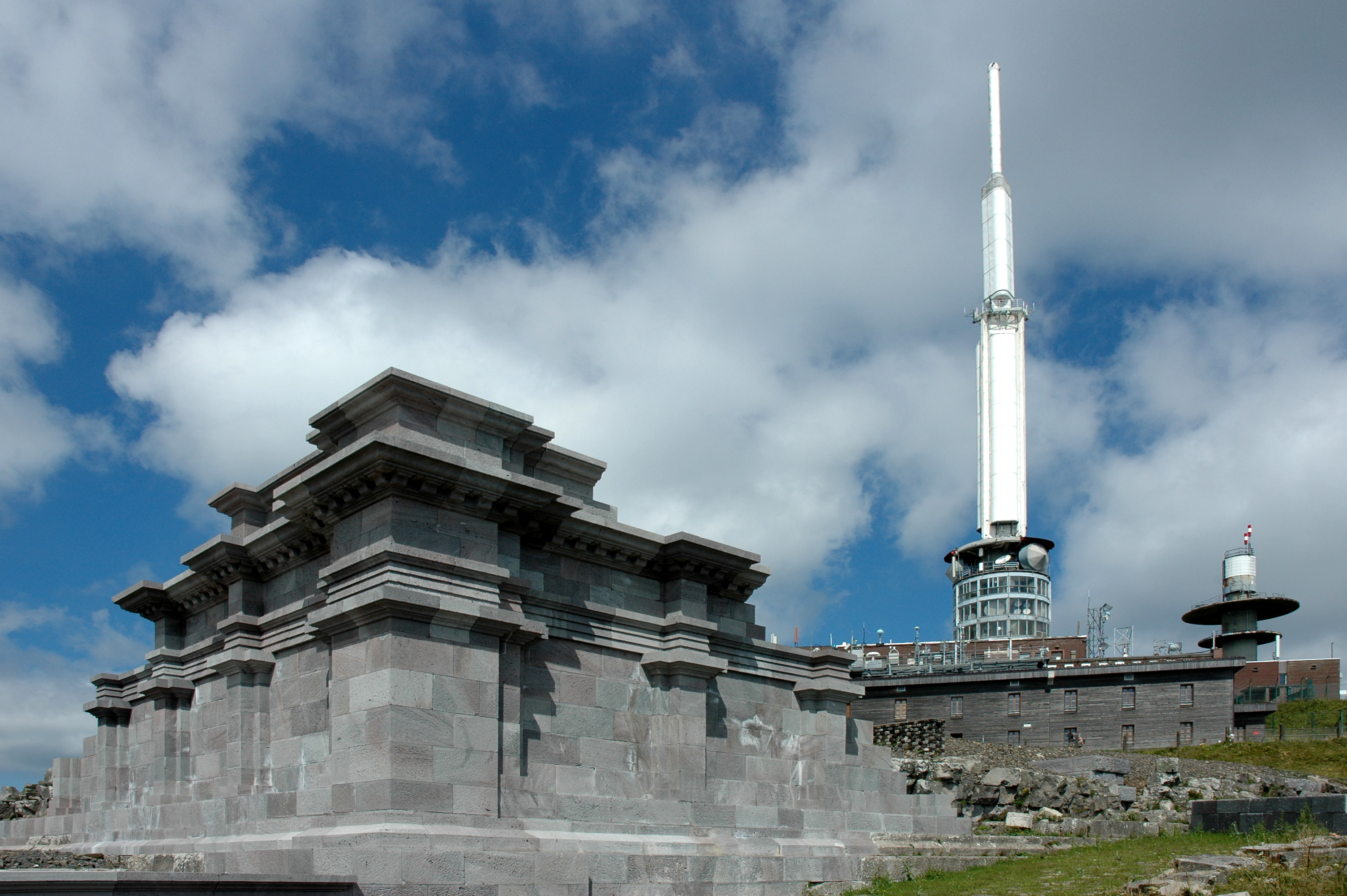 Temple de Mercure, Pylone TDF du puy de Dôme